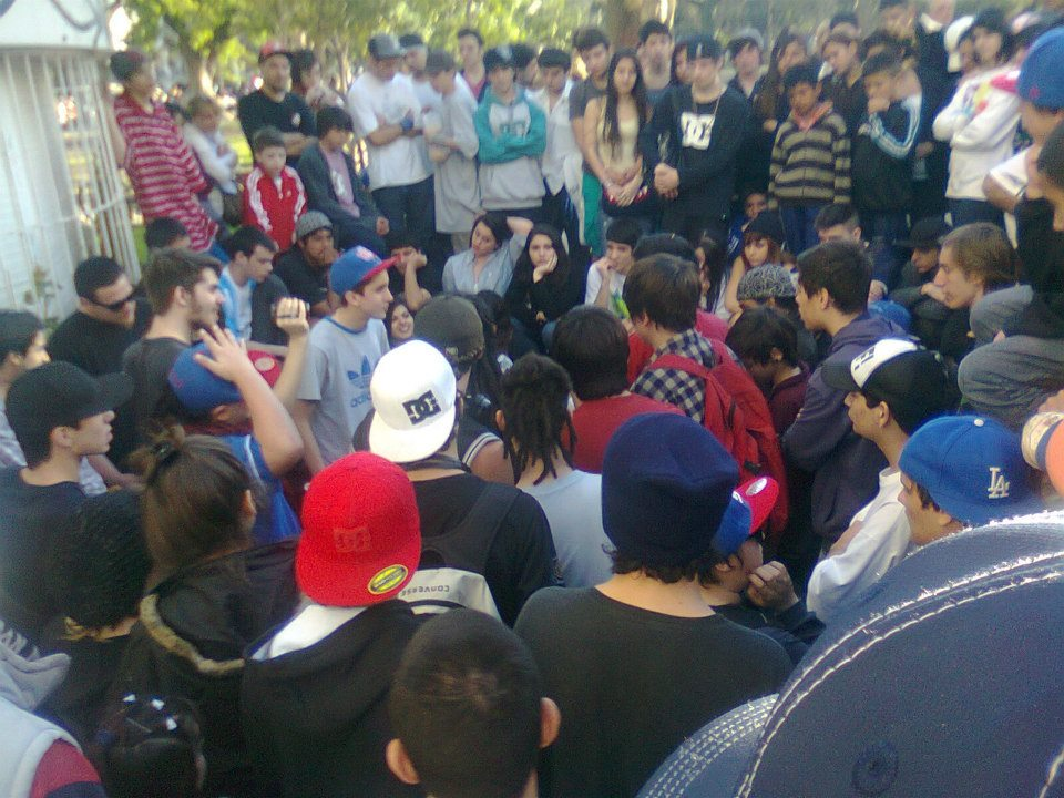 Esta es una fotografía de la competencia de freestyle rap "El 5to Escalón".